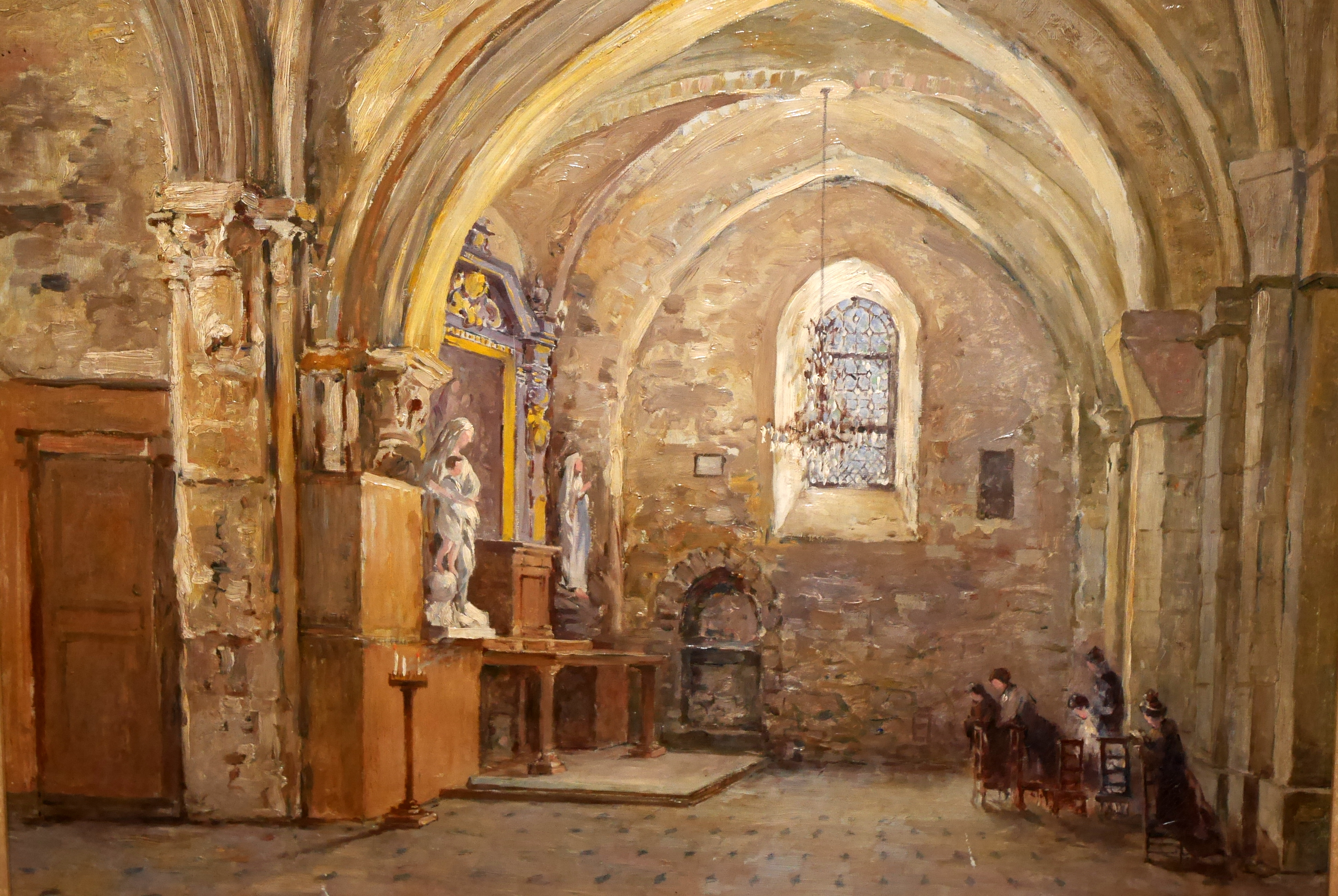 William Thorney, la chapelle de la Vierge Marie, église d'Osny